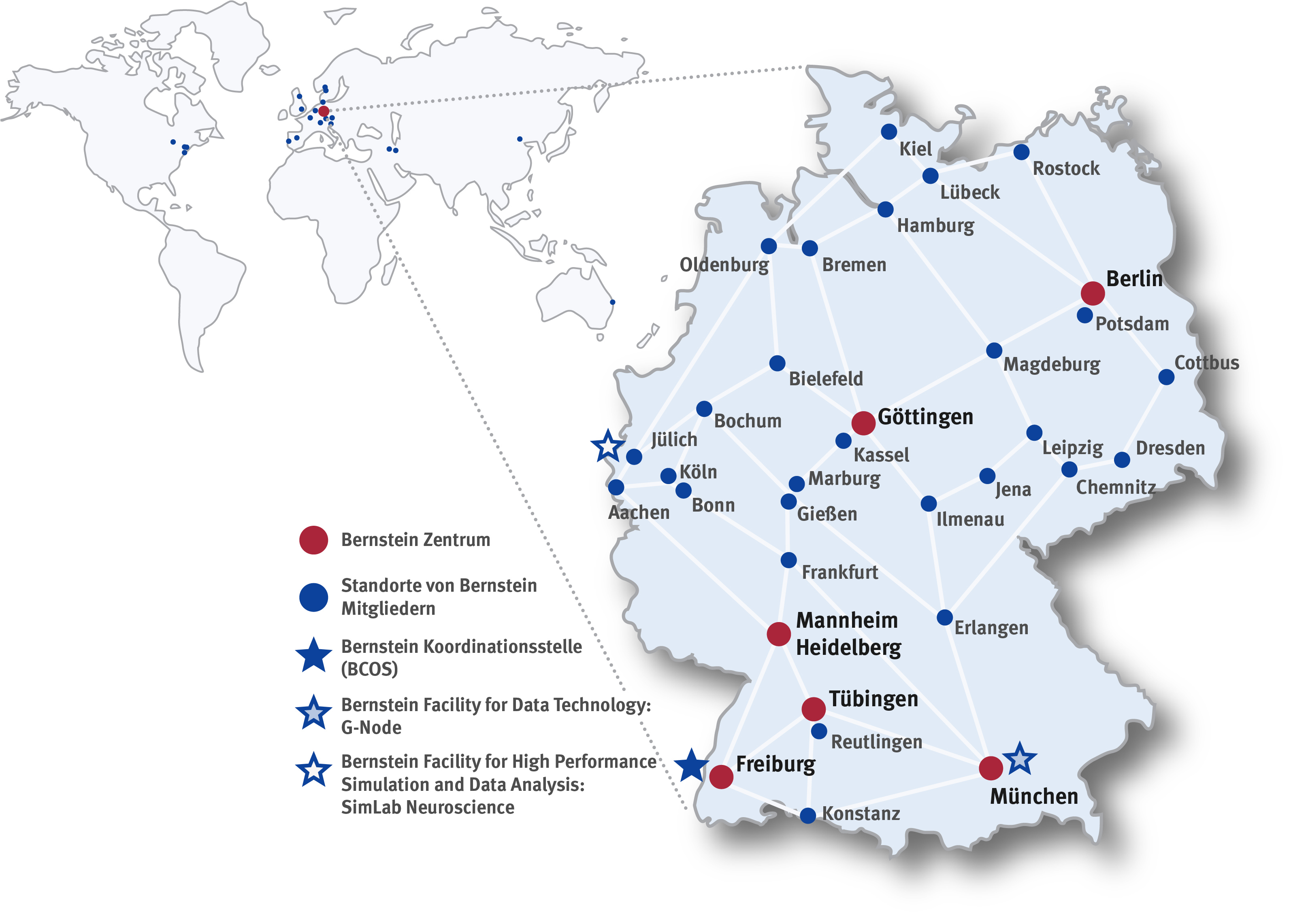 Bernstein Netzwerkkarte